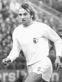 Title: FDGB-Pokal, BFC Dynamo - 1. FC Magdeburg 3:1 Factual corrections and alternative descriptions are encouraged separately from the original description. Additionally errors can be reported at this page to inform the Bundesarchiv. Original historic description: ADN-ZB-Mittelstädt-7.12.75-str-Berlin: FDGB-Pokal Viertelfinale BFC Dynamo - 1. FC Magdeburg 3:1- In der 6. Minute bahnt sich im Berliner Jahn-Sportpark das 1:0 für den BFC an. Wroblewski (BFC-r.) schießt scharf auf das Tor von Magdeburg, den abgewehrten Ball kann Woplf-Rüdiger Netz (Mitte) unbedrängt einschießen. Links Detlef Raugust von der Magdeburger Meistermannschaft.